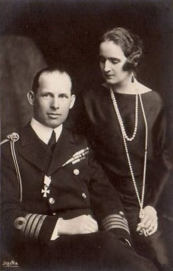 le roi Georges II de Grèce et la reine Elisabeth de Roumanie